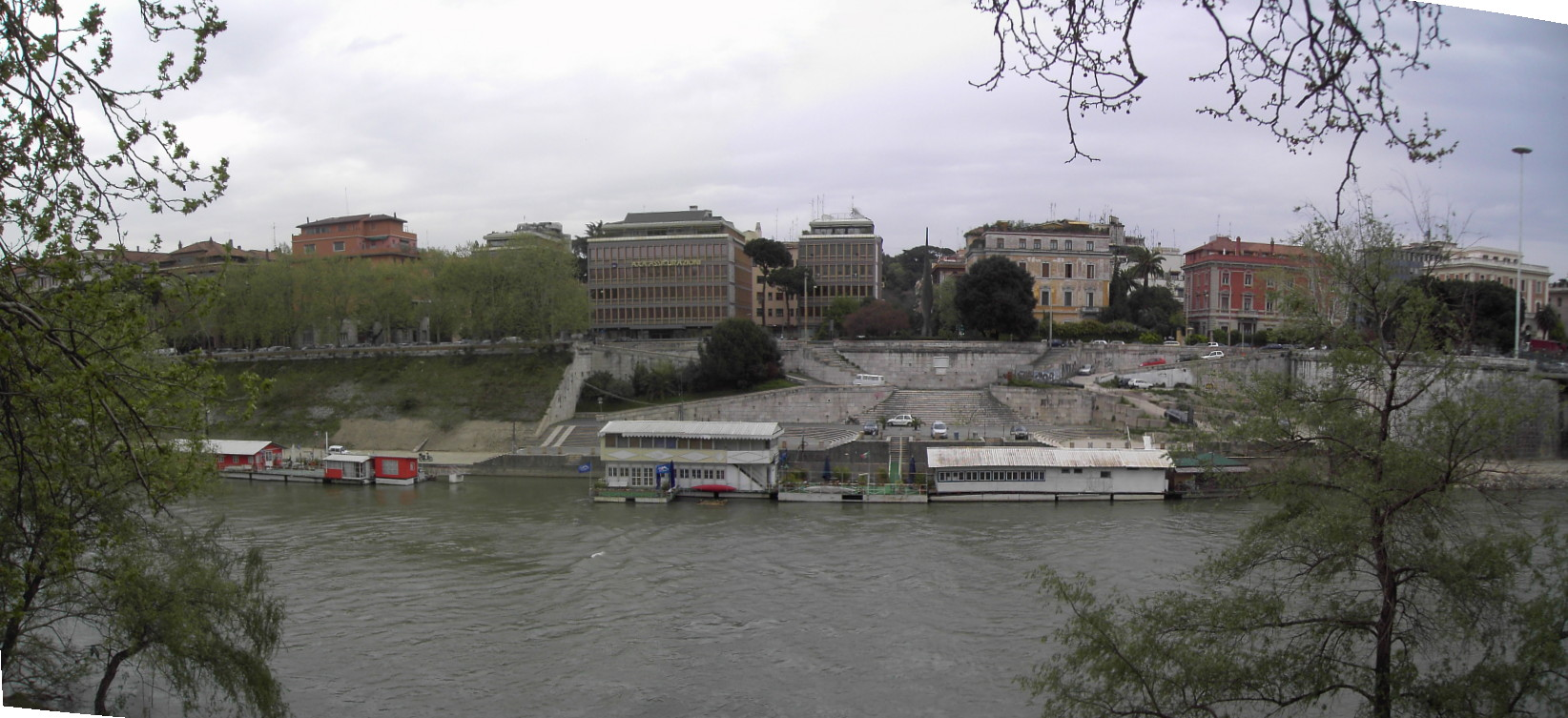 Roma, lungotevere Arnaldo da Brescia e scalo de Pinedo